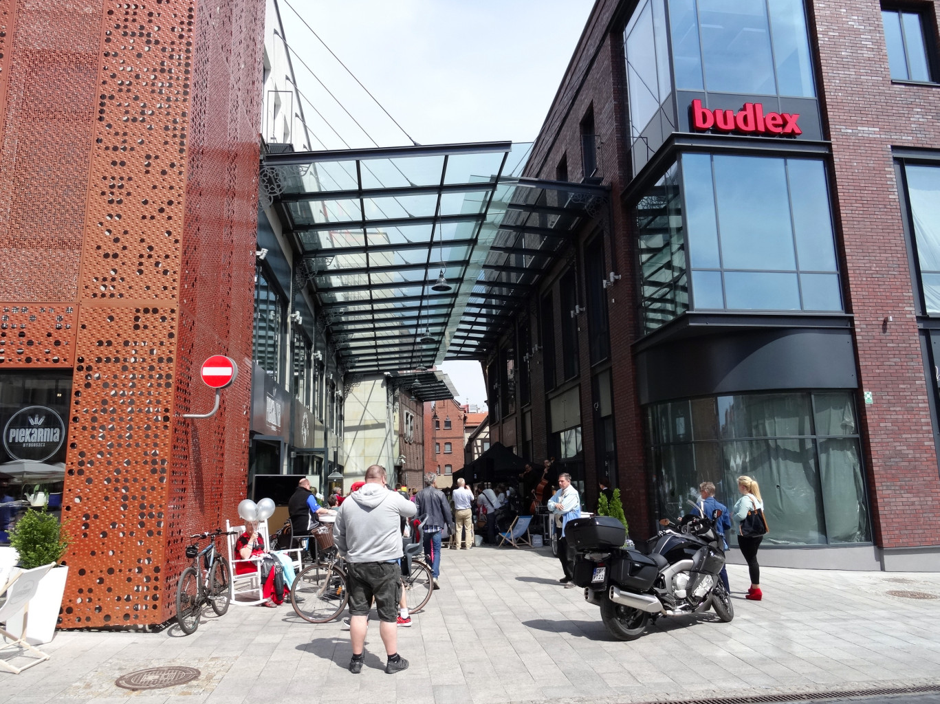 Ulica Jatki w Bydgoszczy